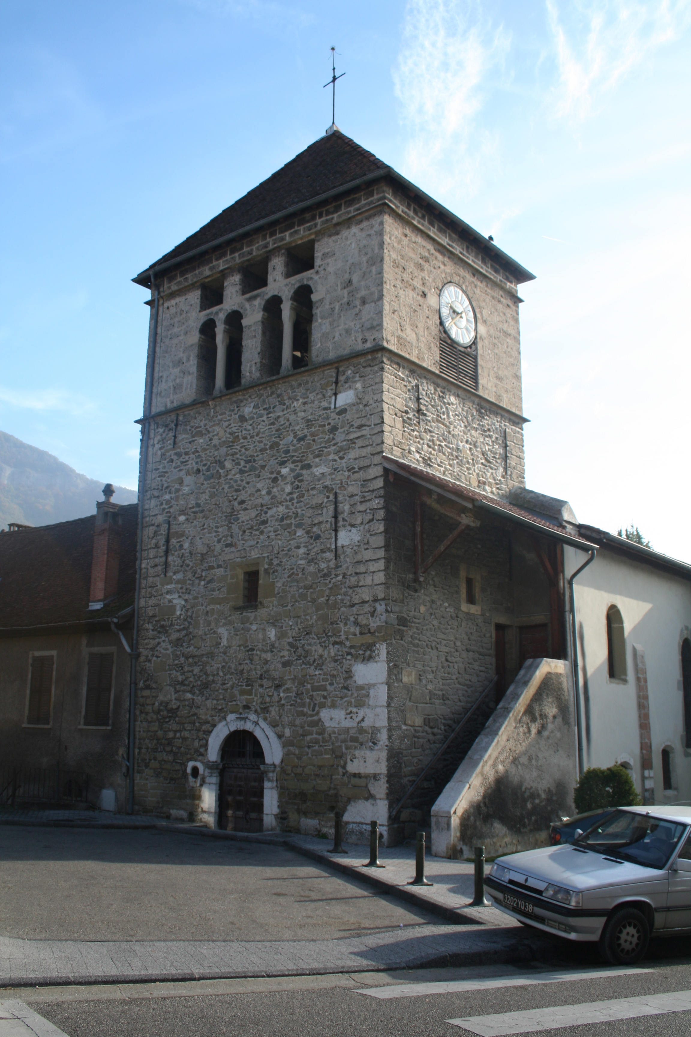 Voiron (Isère) - Église Saint-Pierre.